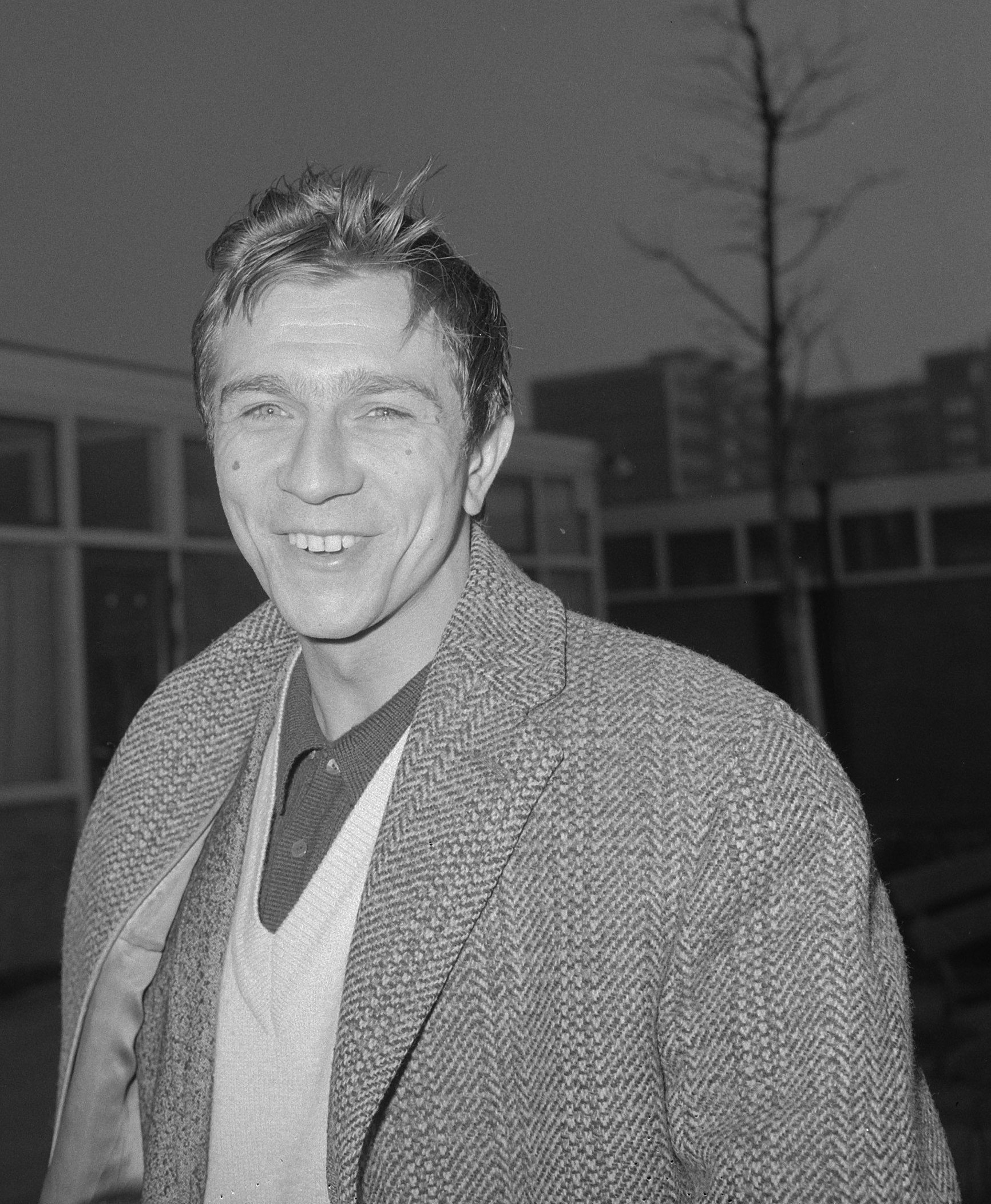 Collectie / Archief : Fotocollectie Anefo Reportage / Serie : [ onbekend ] Beschrijving : Spelers DWS Frits Flinkevleugel Datum : 4 maart 1965 Trefwoorden : sport, voetbal Persoonsnaam : Flinkevleugel, Frits Fotograaf : Nijs, Jac. de / Anefo Auteursrechthebbende : Nationaal Archief Materiaalsoort : Negatief (zwart/wit) Nummer archiefinventaris : bekijk toegang 2.24.01.03 Bestanddeelnummer : 917-4991